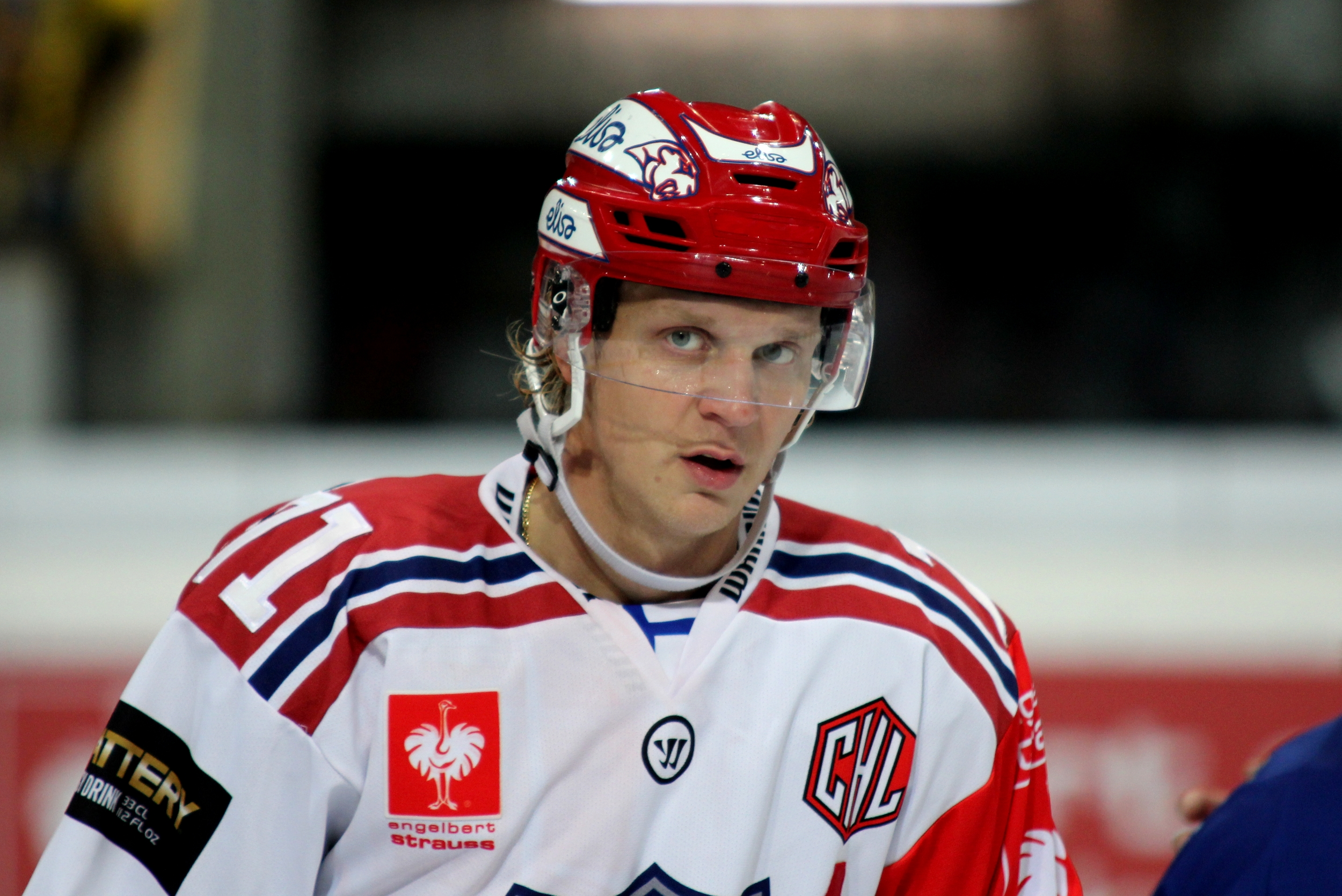 Juuso Puustinen (H 71).